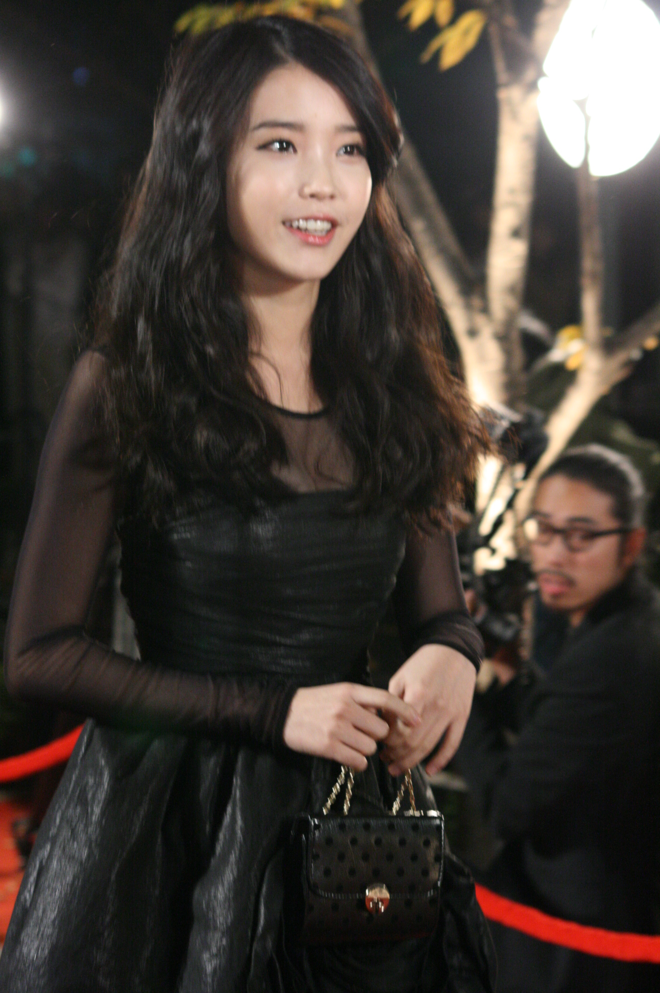 2011인드브랜드페어&2011스타일아이콘어워즈 793